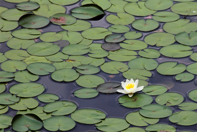 Nénuphar blanc du Lac de l'Avellan dans le département du Var - France